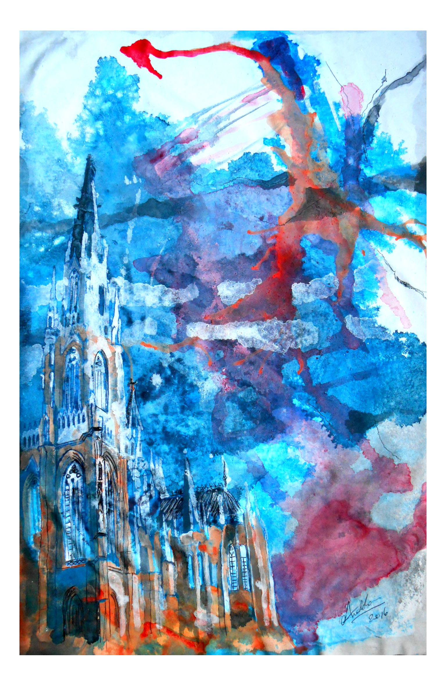 Acuarela sobre tela Black out vinílico, 35cm x 50cm, por Sergio Ardohain, 2016.